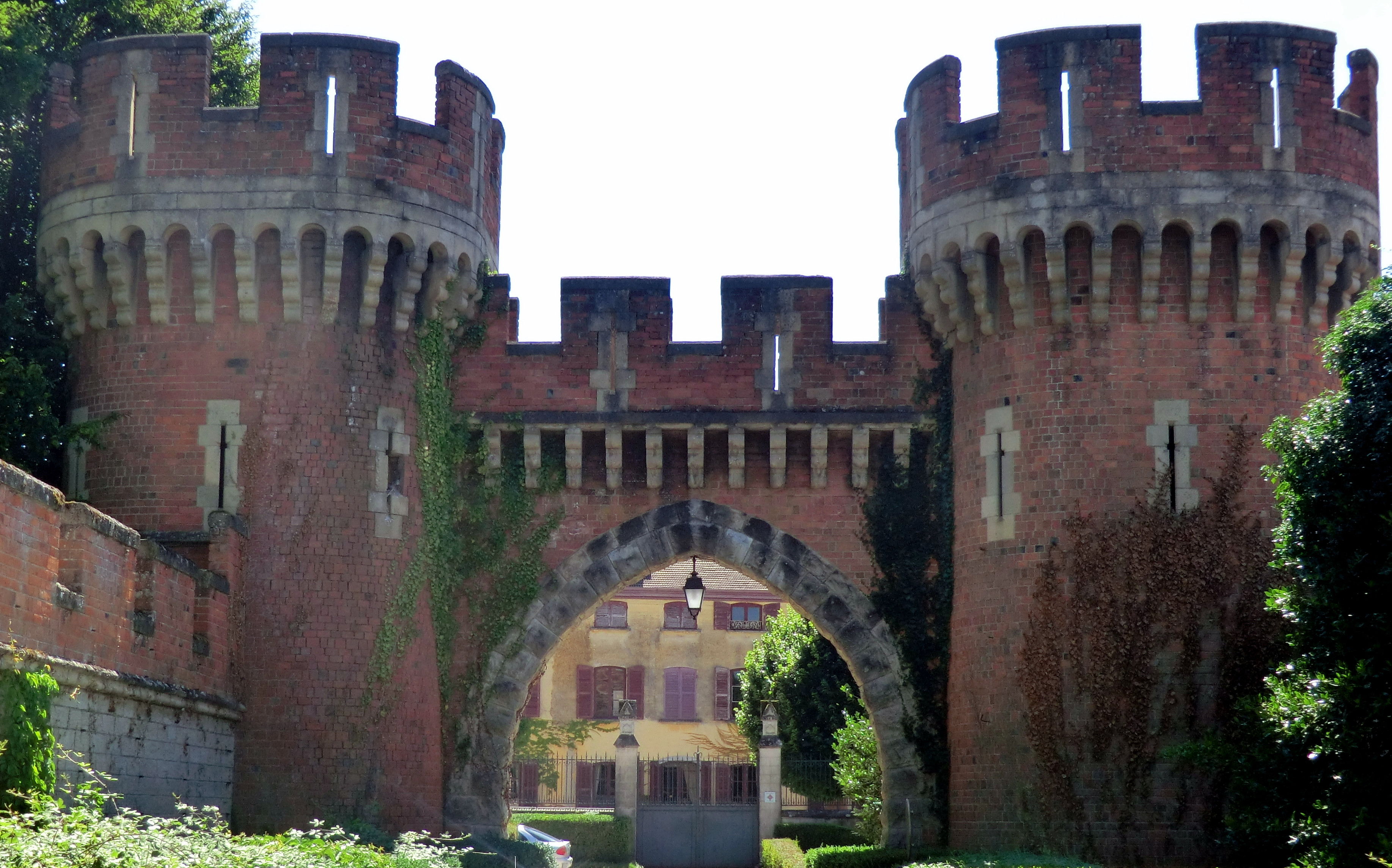 Château de Loyes.